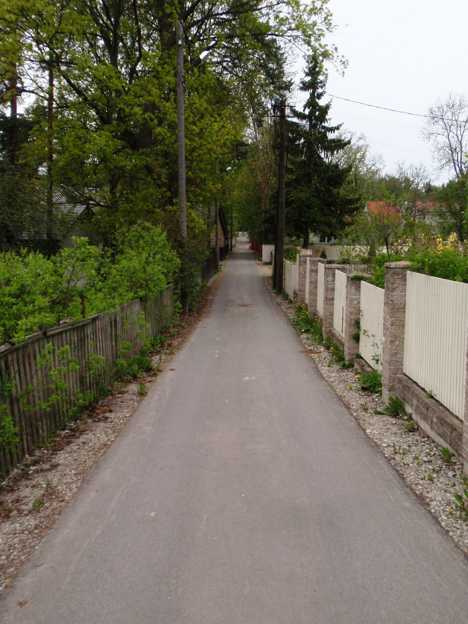 Kitsas tänav Tallinnas Nõmmel.